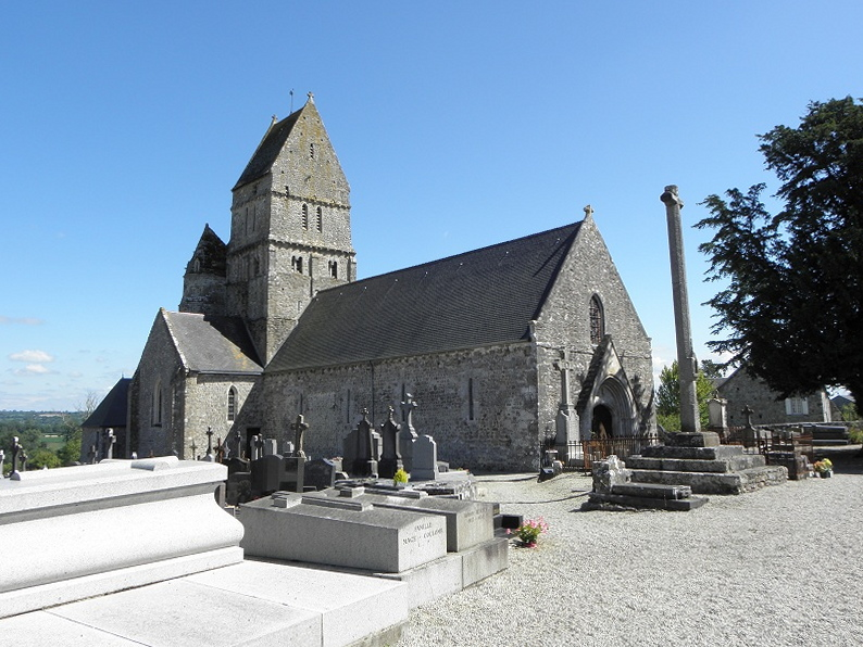 Façade occidentale et flanc nord de l'église Sainte-Hélène à Orval (50) .